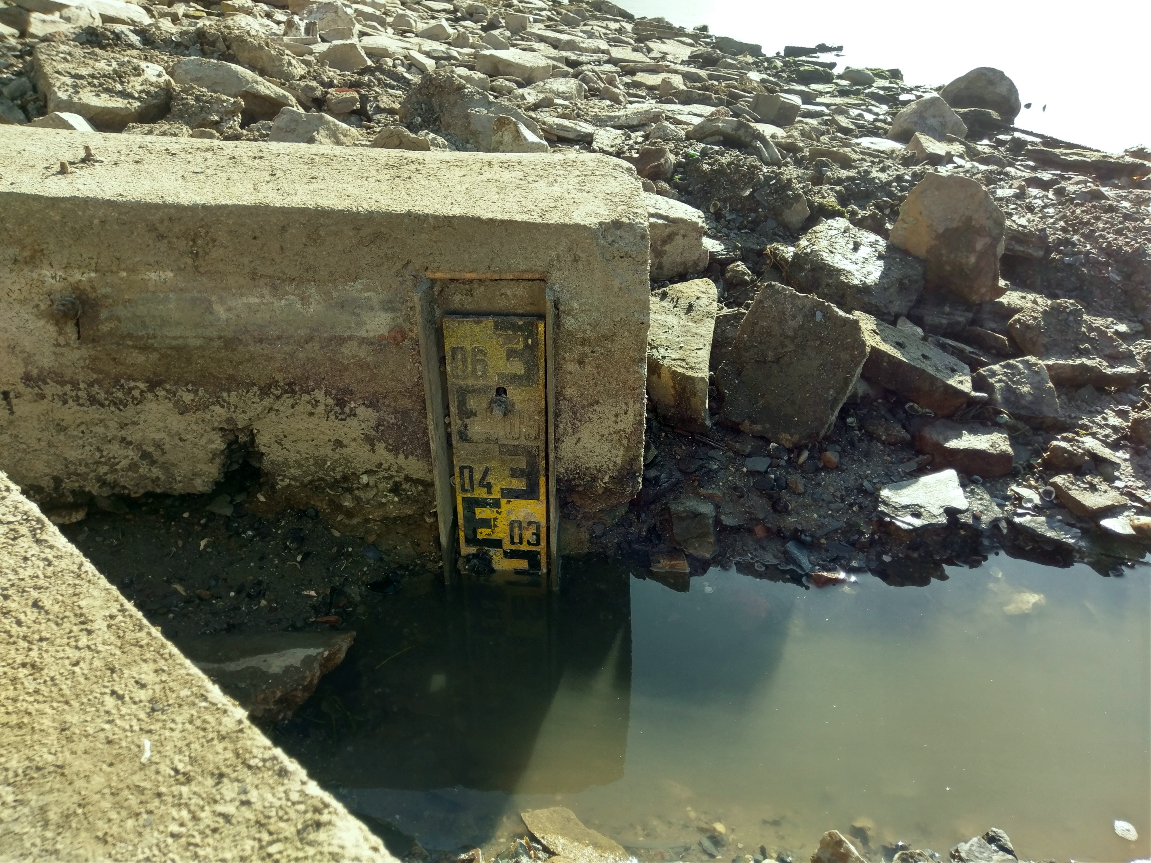 Pegel Kaub bei Niedrigwasser 2018. Pegelstand bei 27-28 cm am 21. Oktober 2018. Kaub am Rhein, Rheinland-Pfalz